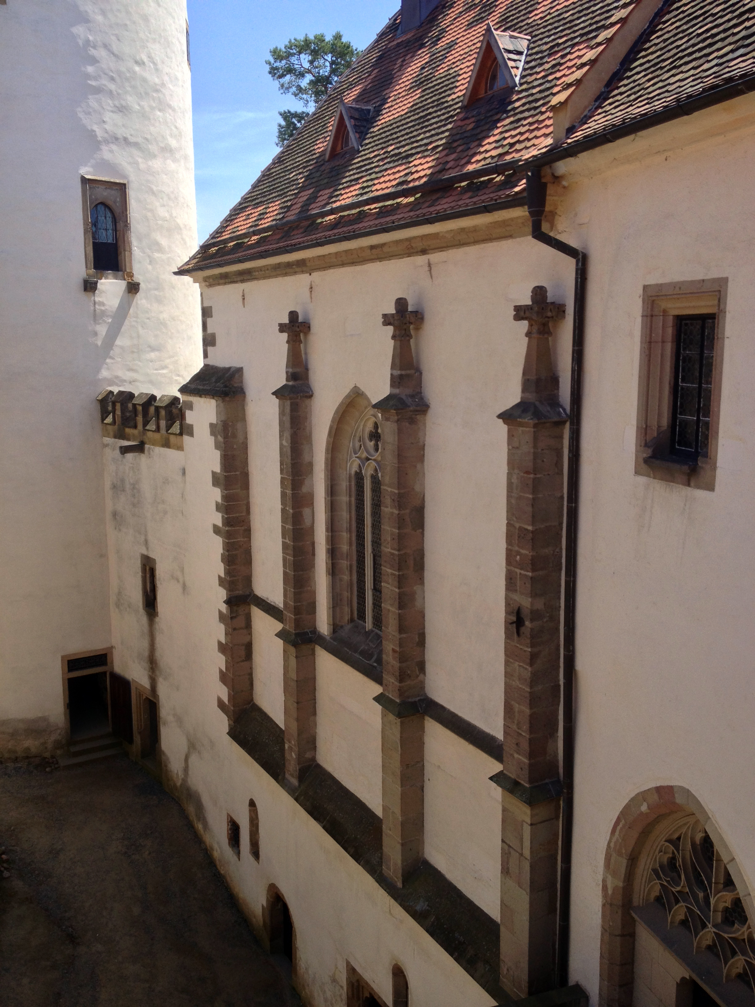 exteriér kaple